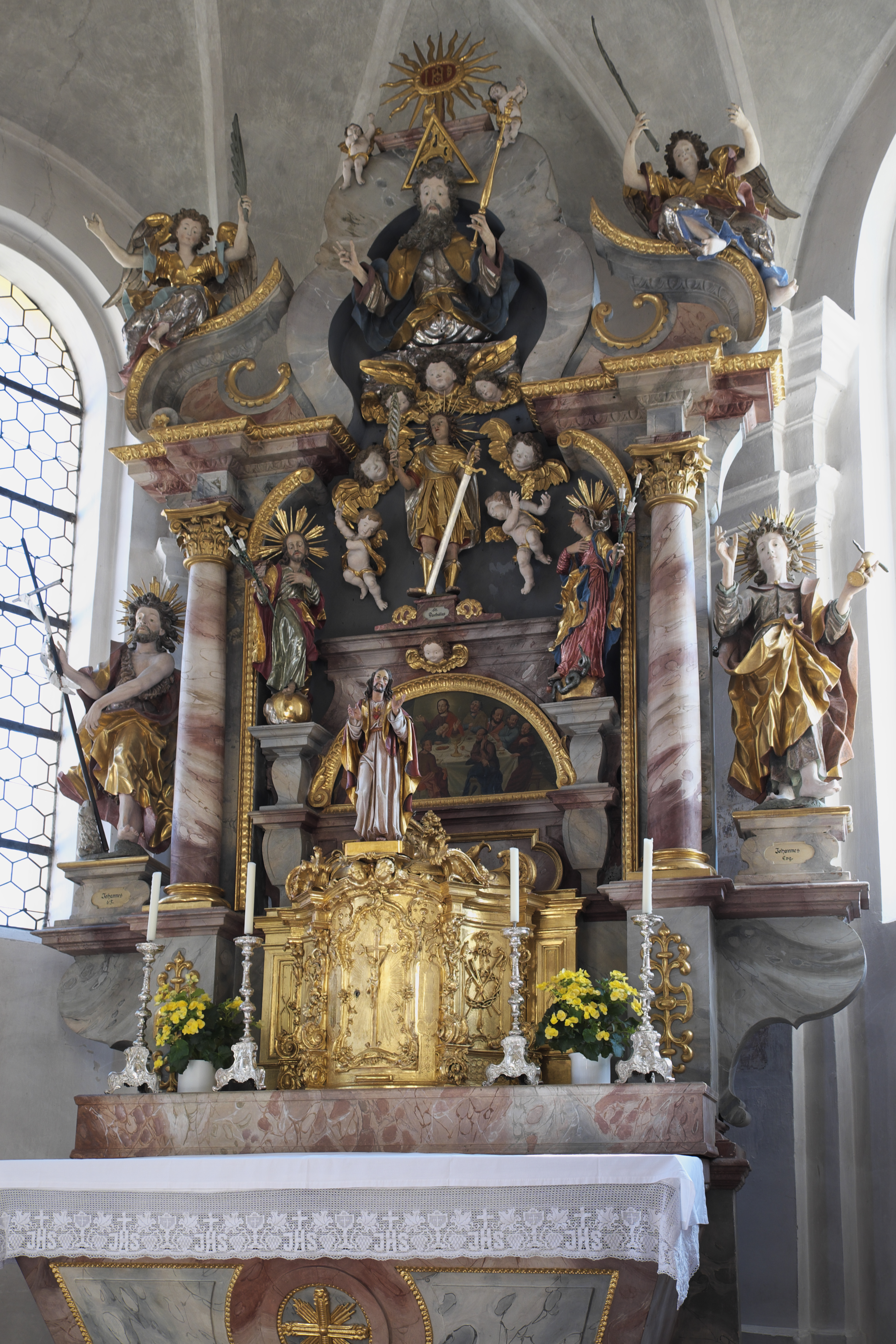 Katholische Filialkirche St. Pankratius in Ramsach (Penzing) im Landkreis Landsberg am Lech (Bayern/Deutschland), Hochaltar mit Figuren aus der Landsberger Luidl-Werkstatt